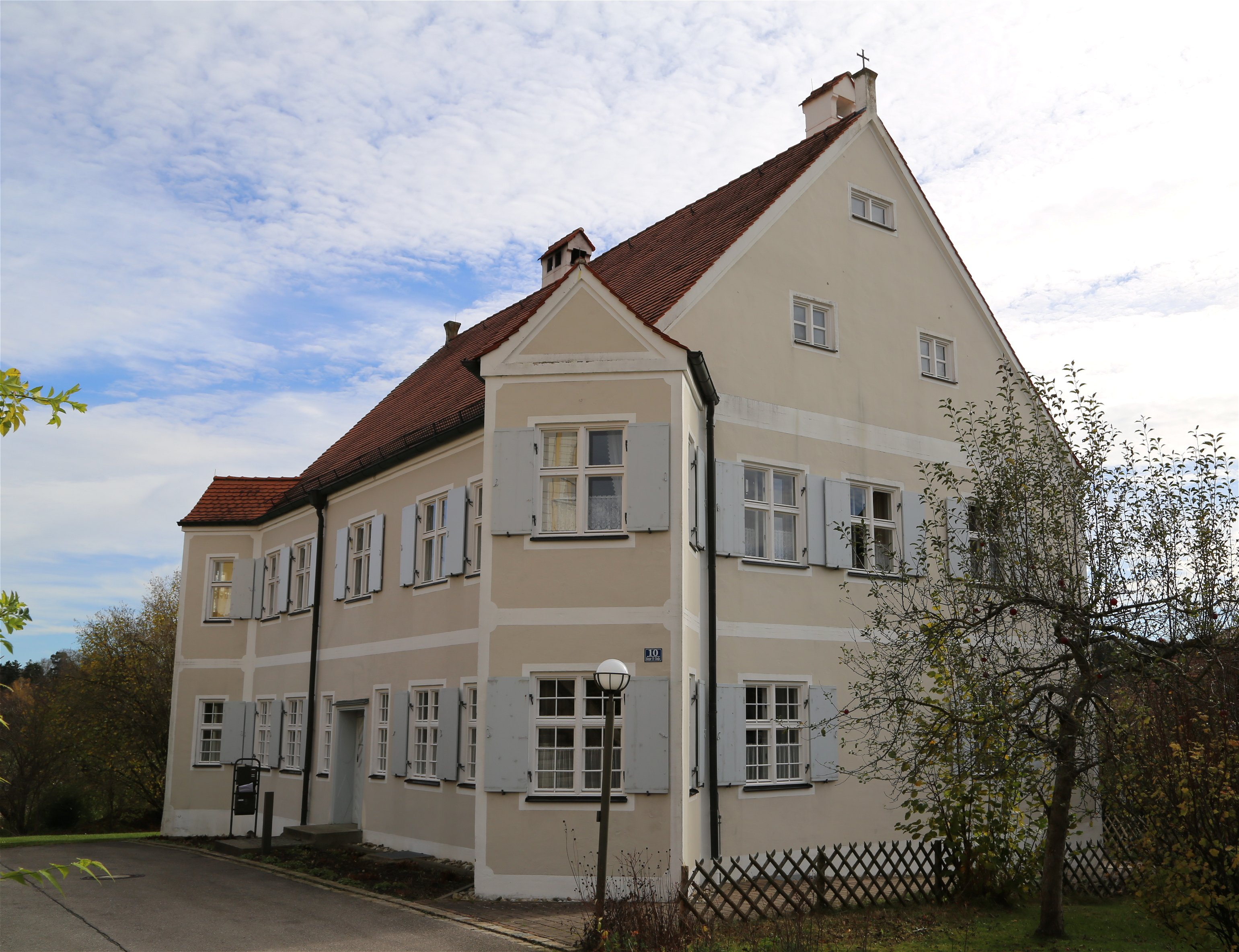 Kaspar-Ett-Straße 10; Pfarrhaus, stattlicher zweigeschossiger Putzbau mit Eck-Bodenerkern und Satteldach, von Johann Schmuzer, 1698; ehemaliges Waschhaus, eingeschossiger Satteldachbau, frühes 19. Jahrhundert